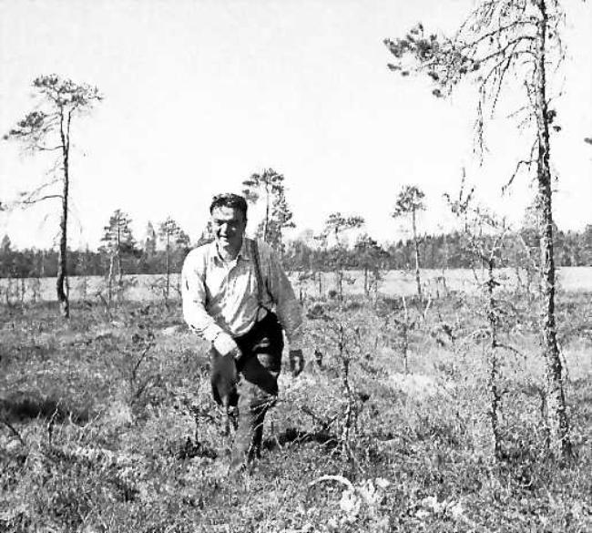 Kirjailija Pentti Haanpää (1905-1955) Piippolan Lamusuolla vuonna 1950.